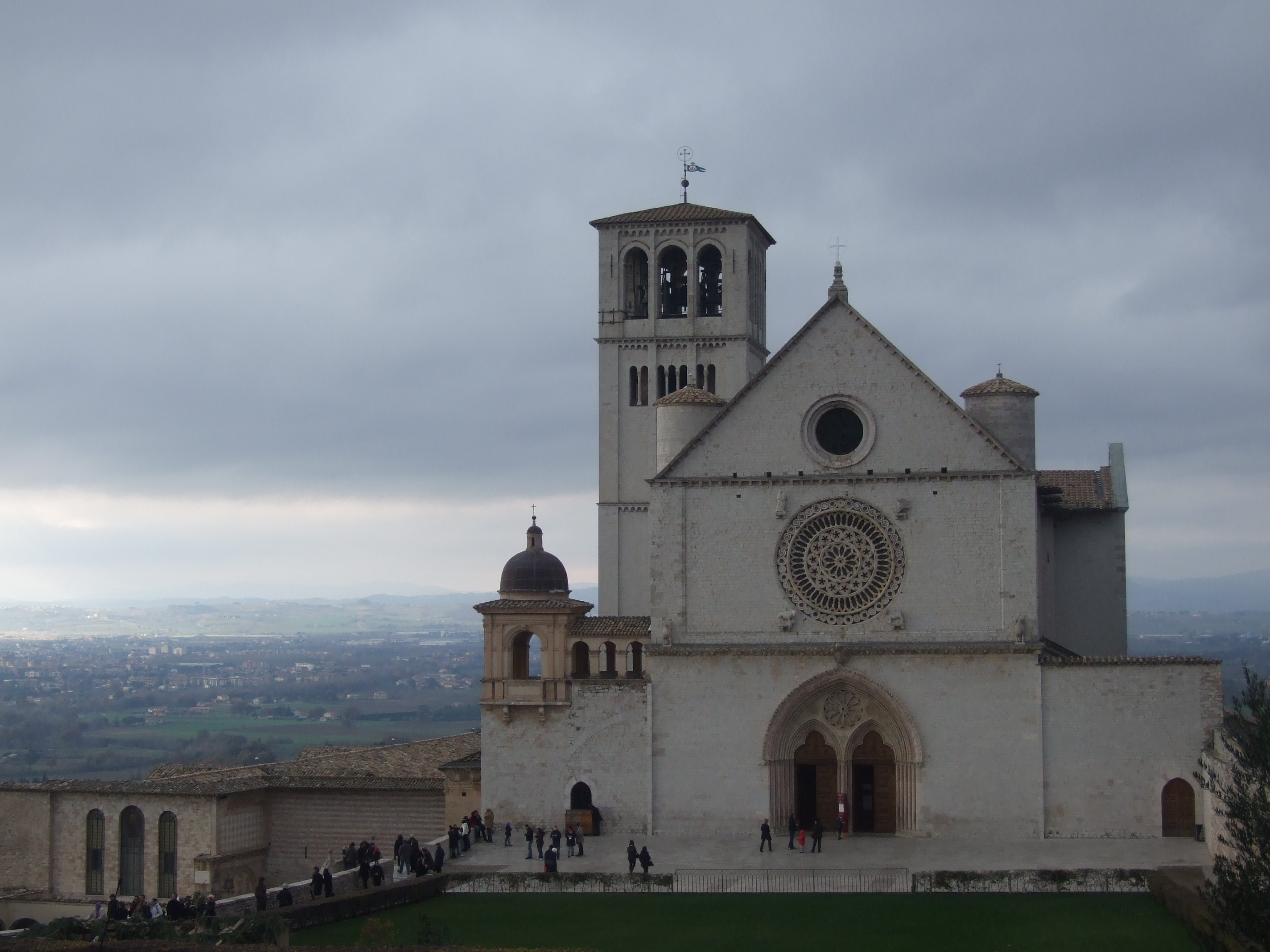 Basílica de San Francisco en Asís.